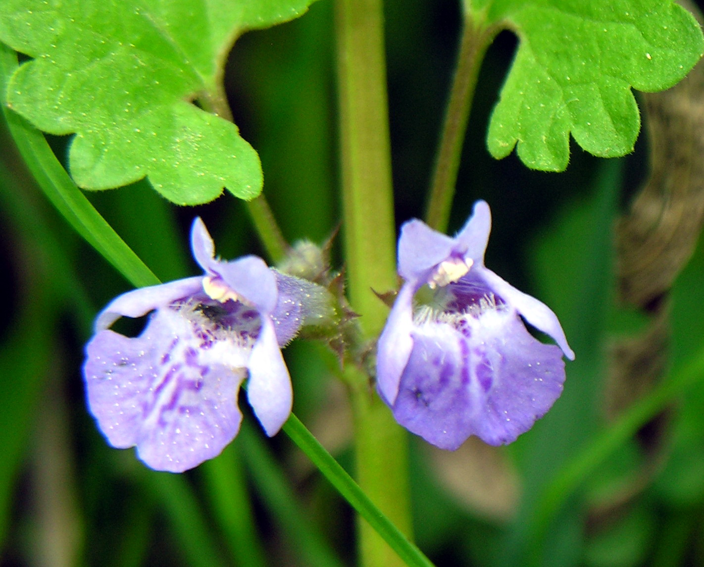 Šliaužiančiosios tramažolės (Glechoma hederacea) žiedai Šeima. Notreliniai (Lamiaceae) Fotografavo: Algirdas, 2006 m. gegužės 13 d., Lietuva